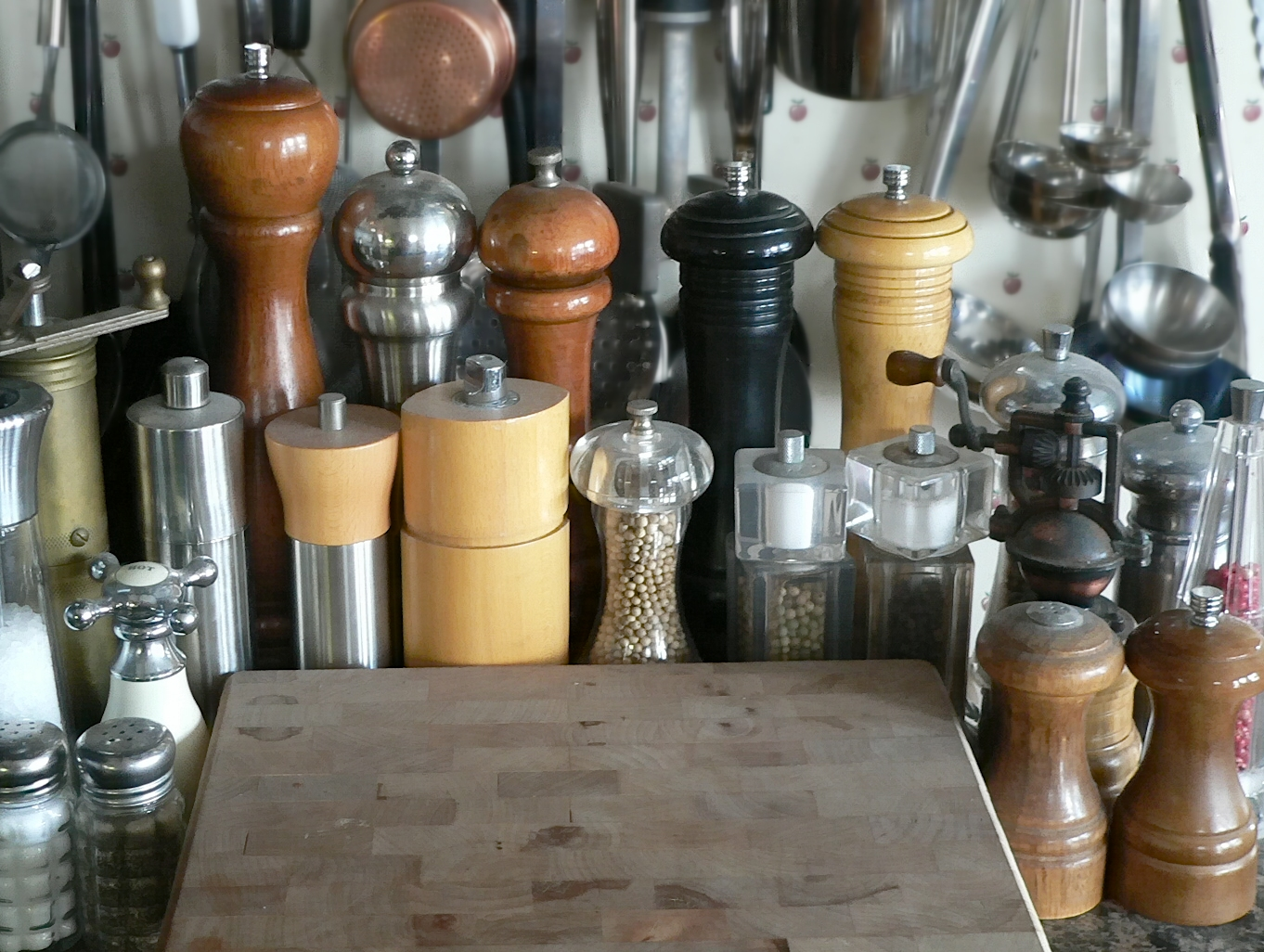 Sammlung von mechanischen Pfeffermühlen in verschiedenen Ausführungen, teils auch mit Kurbel-Betätigung.